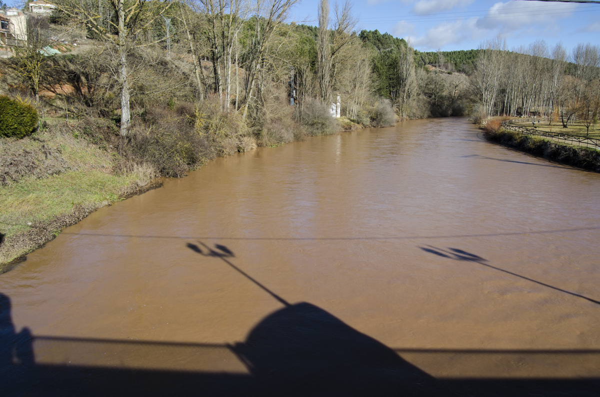 Alar del Rey. Río Pisuerga con crecida por fuertes lluvias.